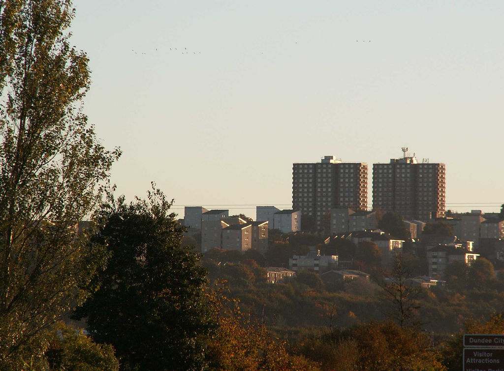 Dundee